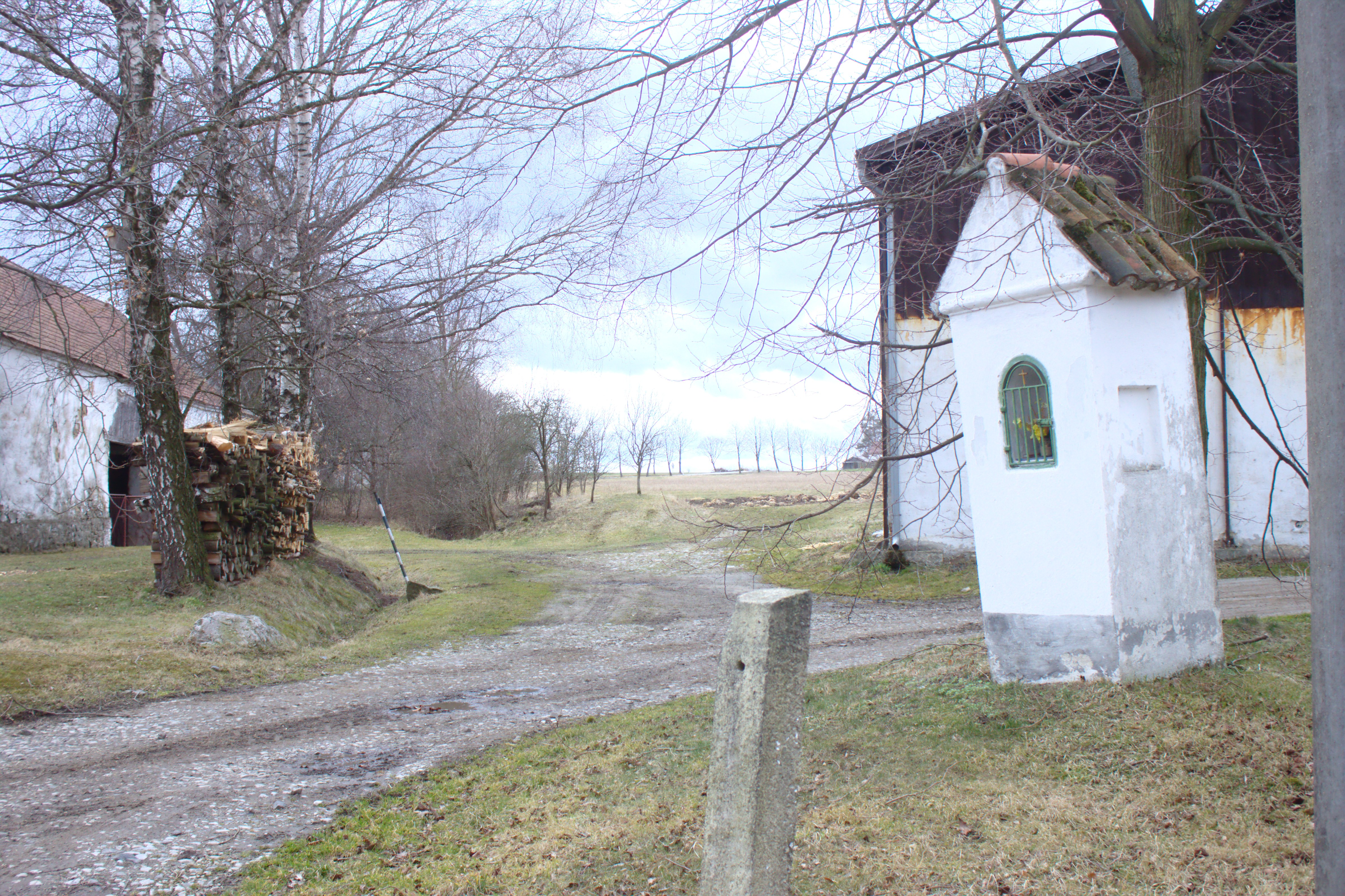 Kaplička ve vesnici Prostřední Svince Project: Fotíme Česko